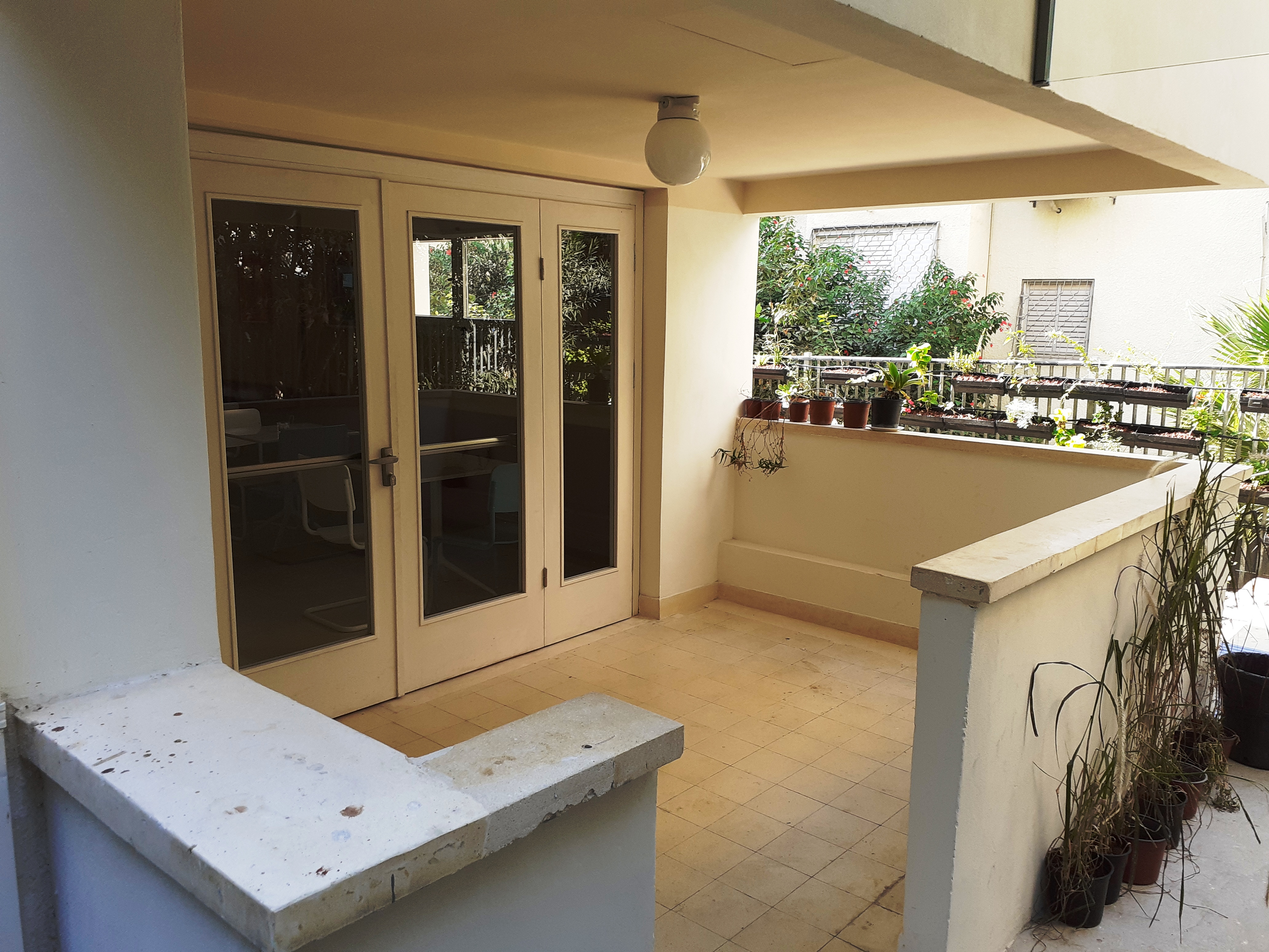 Der Beit Liebling (בֵּית לִיבְּלִינְג) / das Lieblinghaus - rückwärtiger Balkon, Quartier Bialik, Tel Aviv-Jaffa